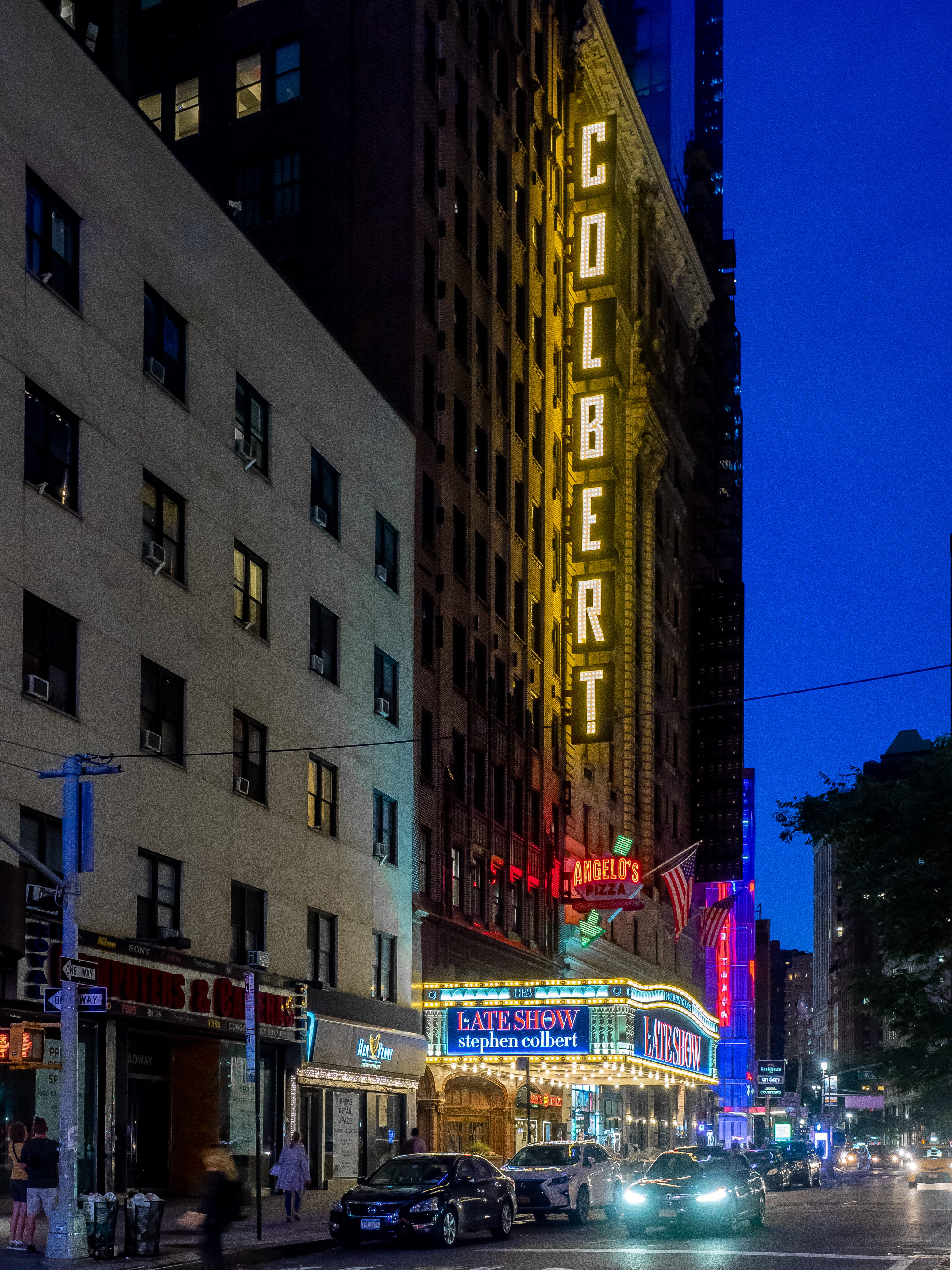 With Stephen Colbert Signage